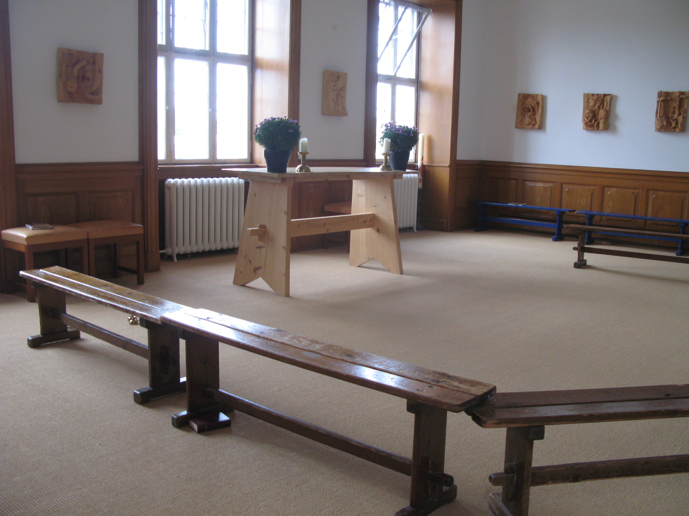 Foto taget af Institut Sankt Joseph